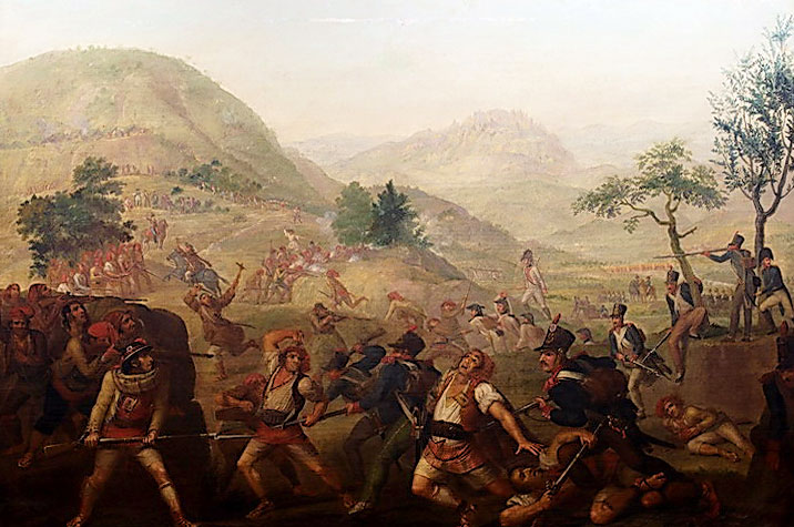 Escena de la Guerra de la Independencia, oil on canvas.